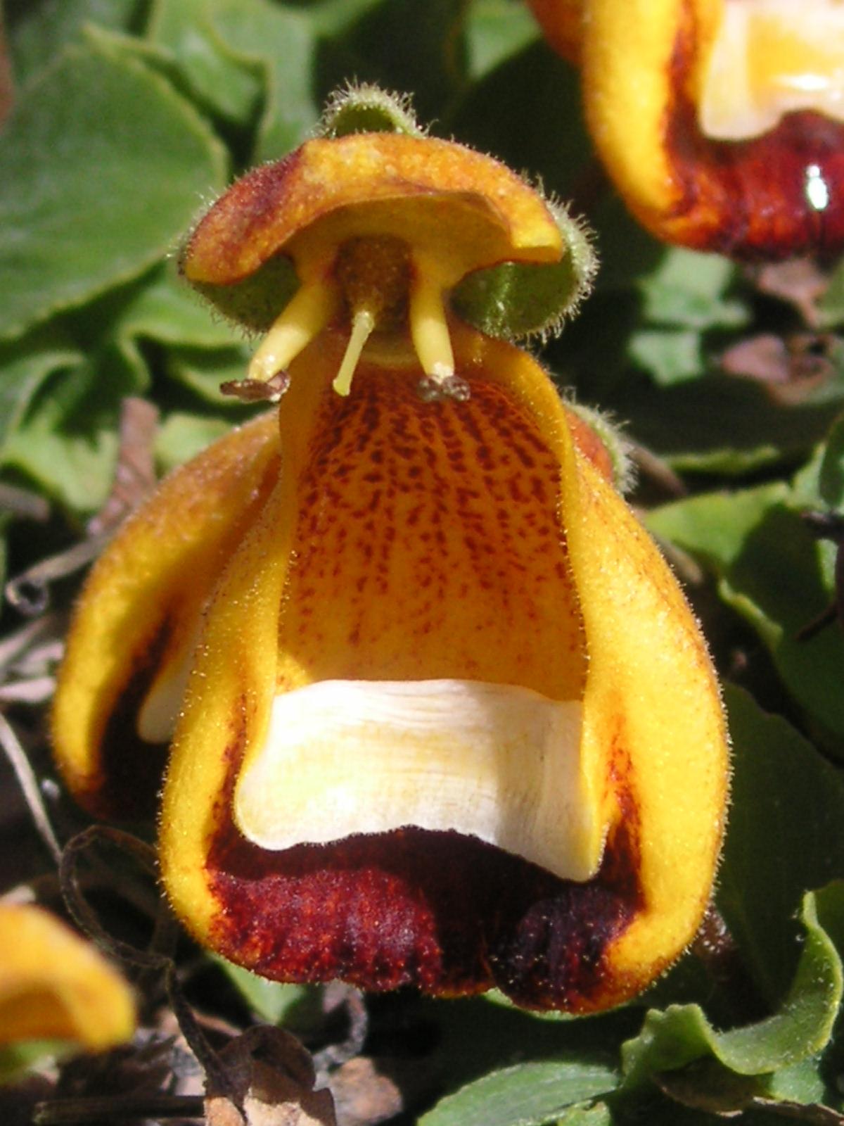 Calceolaria uniflora, Torres del Paine National Park, Chile